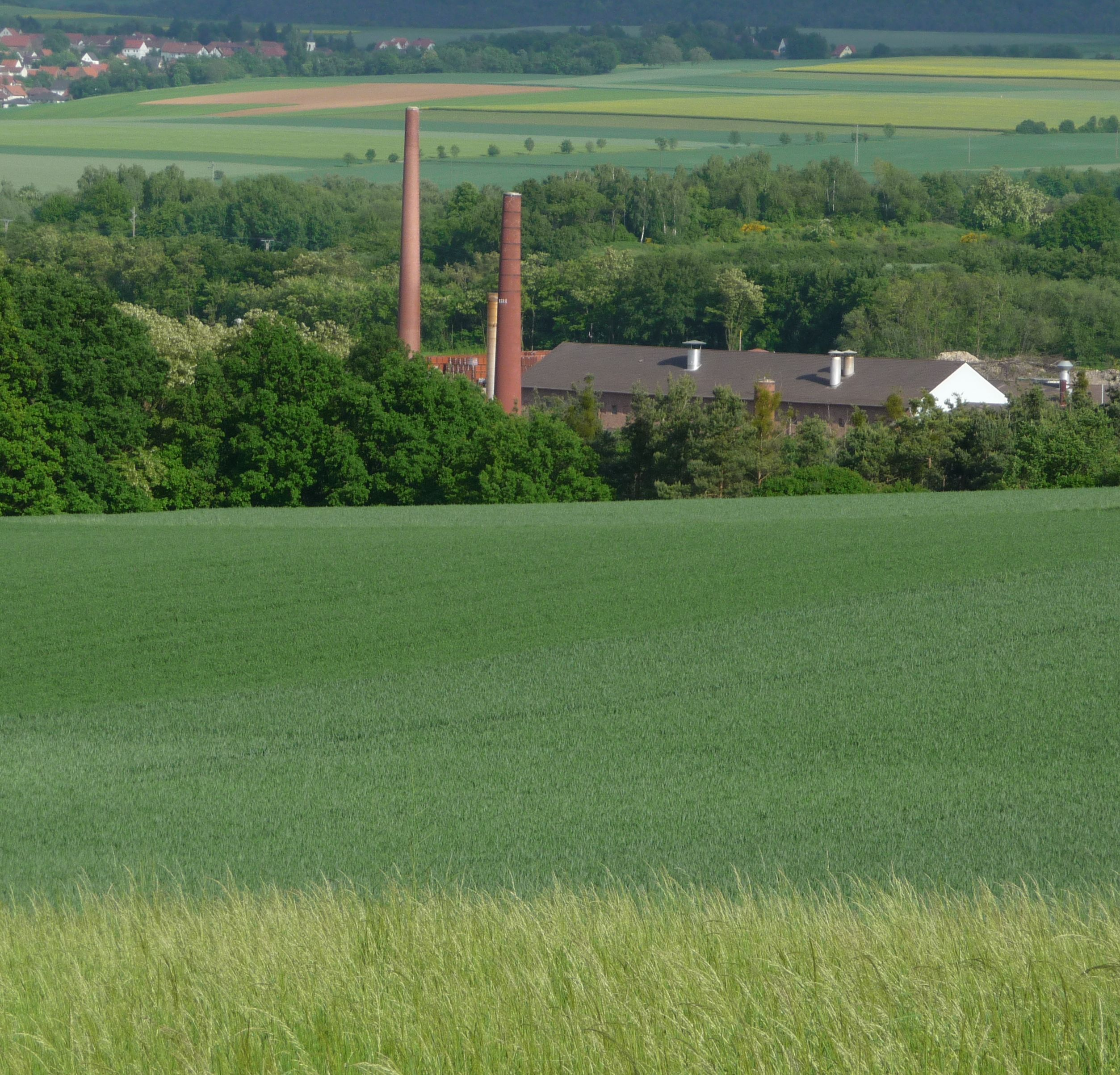 Eisenberg, Germany